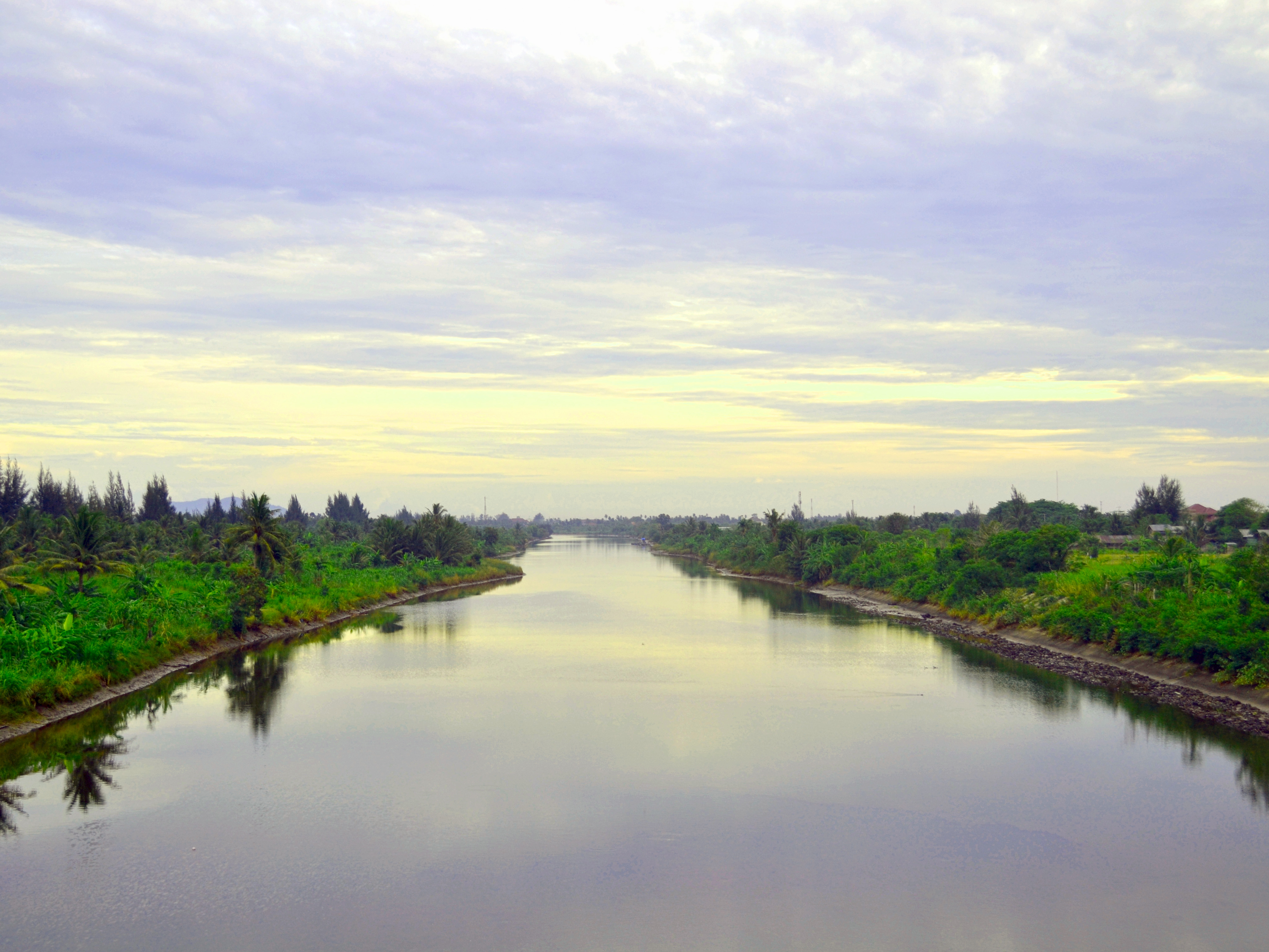 Banjir Kanal Krueng Aceh.